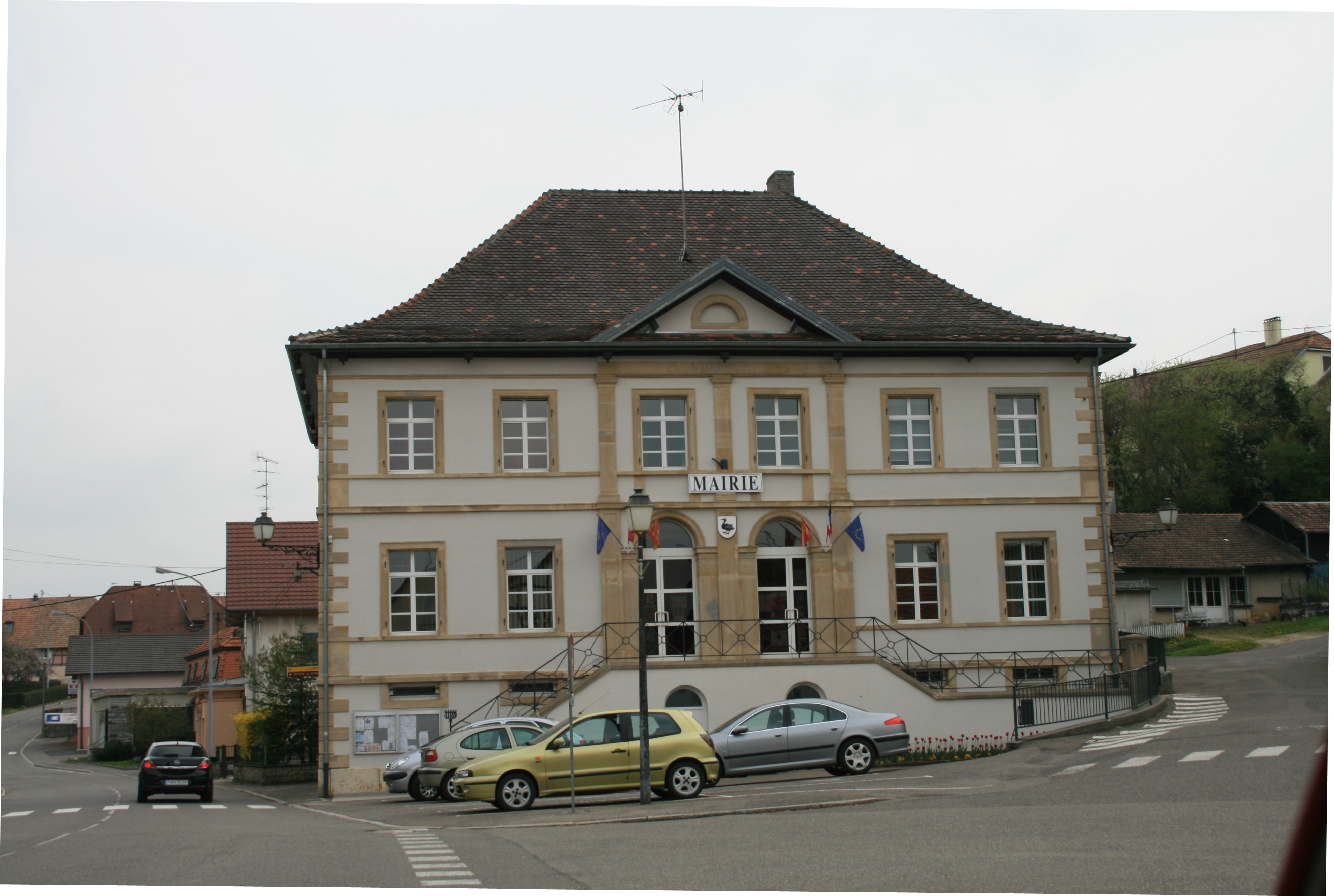 Pfatterhüsa